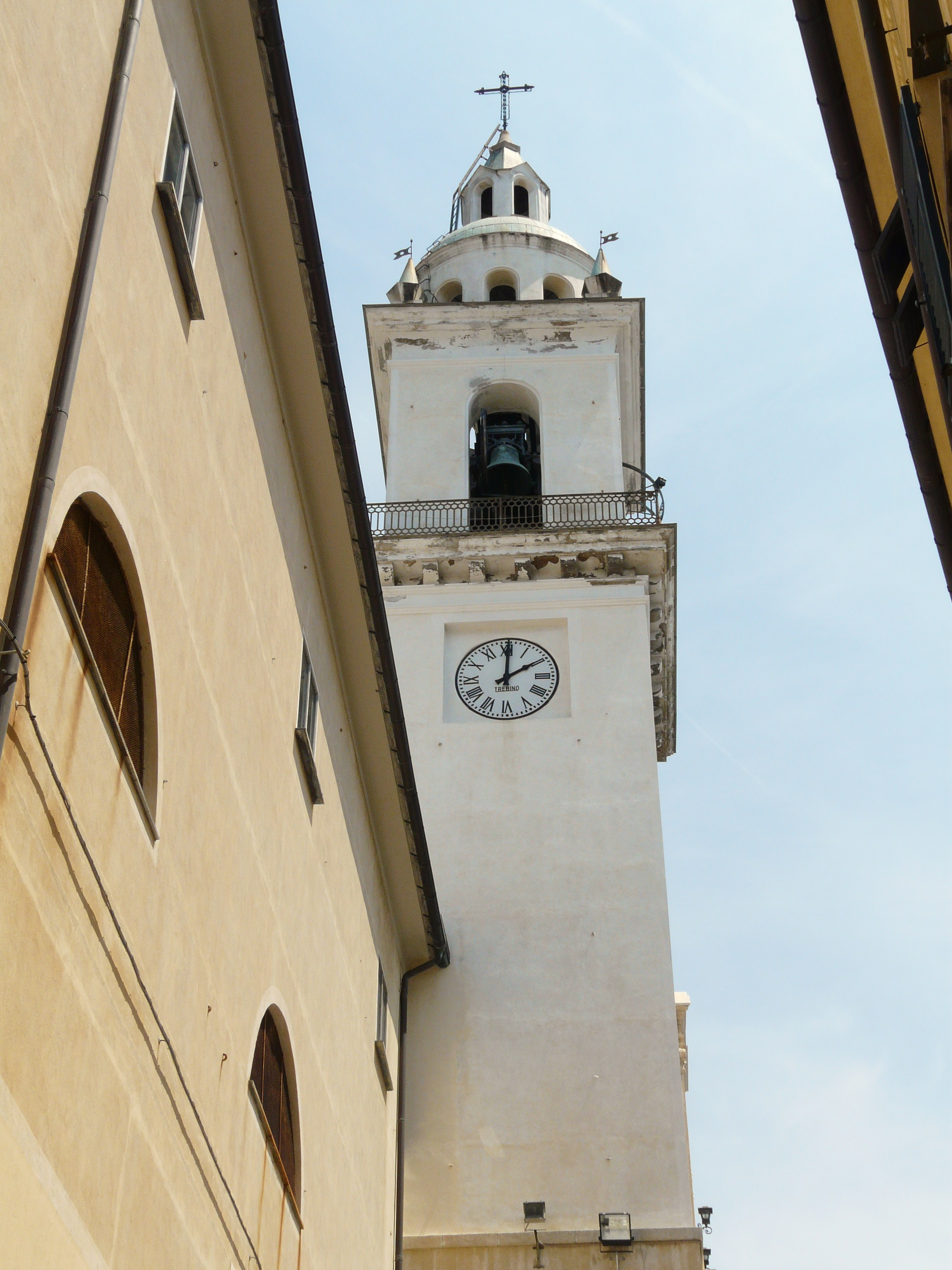 Chiesa di San Pietro, Quinto al Mare, Genova, Liguria, Italia